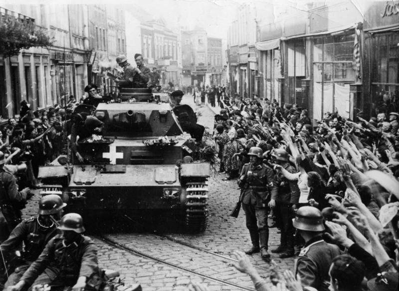 Graudenz, jubelnde Menschen neben Panzer IV Überall bestes Einvernehmen zwischen Truppe und Einwohnern. Alle deutschen Einwohner, auch die anständig gesinnte polnische Bevölkerung, sieht in unseren Soldaten die Befreier von Chaos und Mißwirtschaft, denn jeder verurteilt das schändliche Treiben der Aufständischen und Franktireure und bringt den Sicherungsmaßnahmen unserer Soldaten großes Interesse und Verständnis entgegen. UBz.: Panzerwagen werden Graudenz umjubelt 7.9.39 "Fr" OKW [Polen, Graudenz.- Panzer IV bei Fahrt durch ein Spalier jubelnder Menschen (z.T. mit "Hitler-Gruss")]